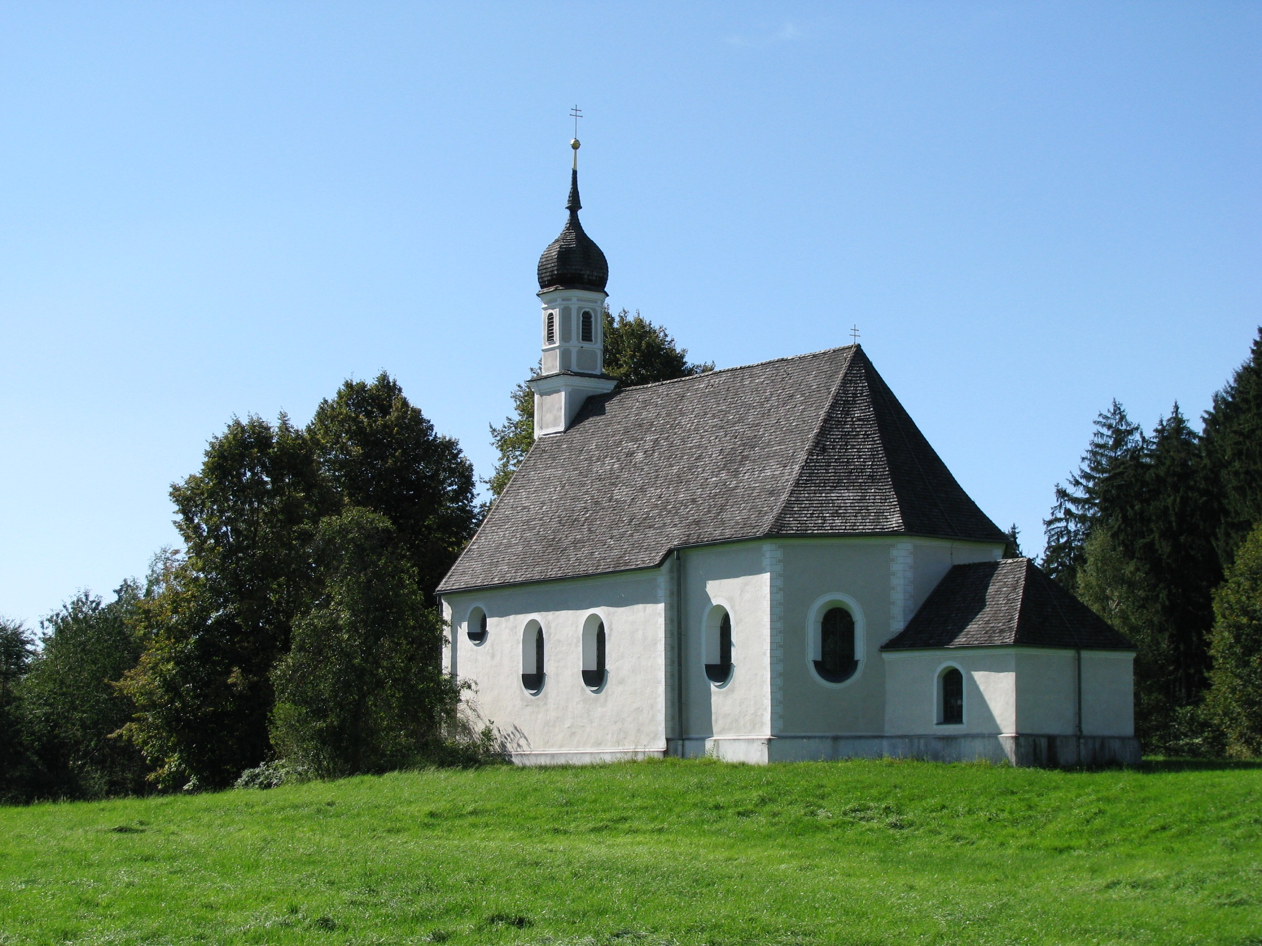 Kapelle St. Kastulus, Ansicht aus östlicher Richtung This is a photograph of an architectural monument.